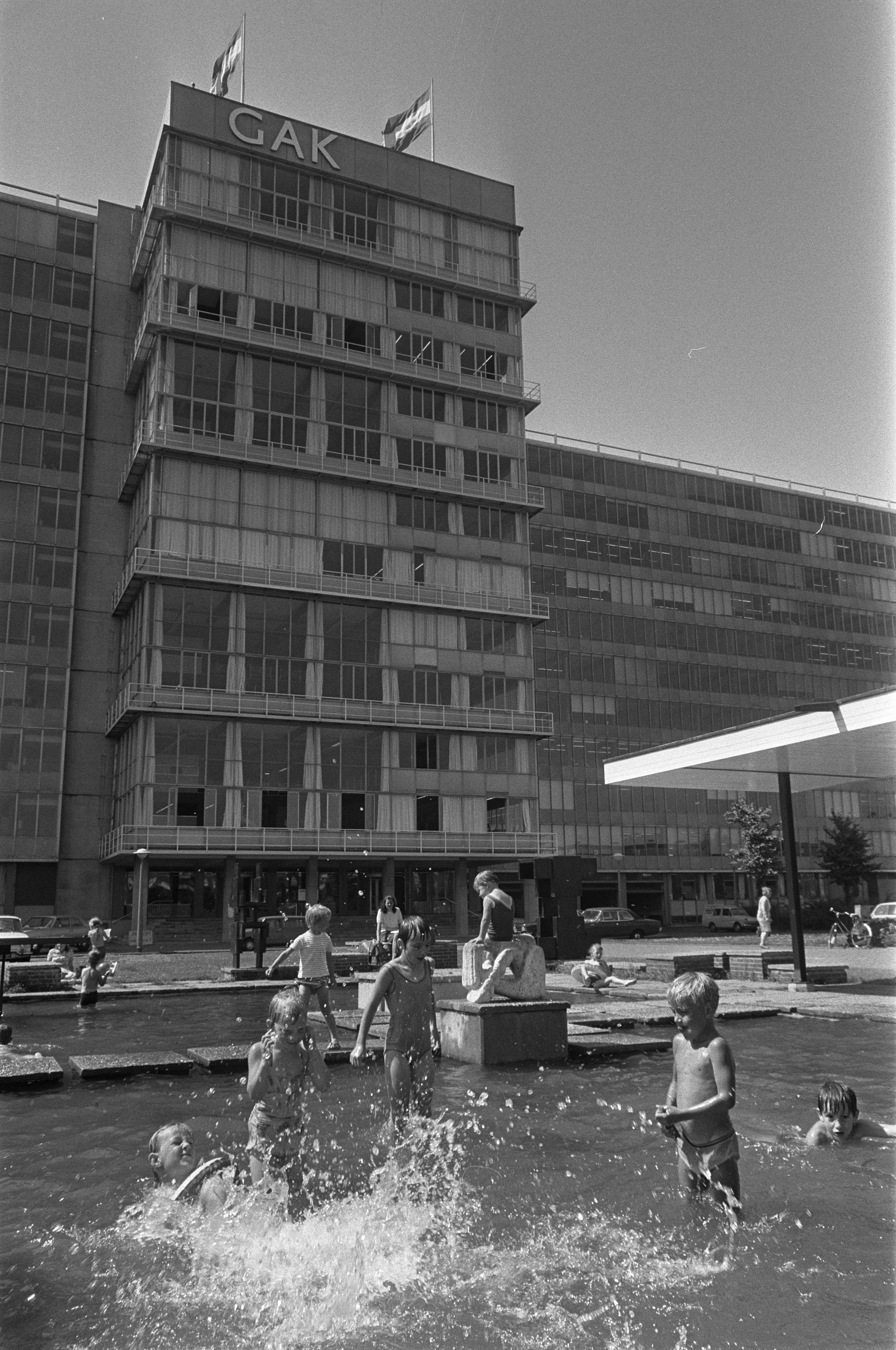 Collectie / Archief : Fotocollectie Anefo Reportage / Serie : Kantoor GAK (Gemeenschappelijk Administratiekantoor), Bos en Lommerplein Amsterdam Beschrijving : kantoren, gebouwen Datum : 15 juli 1969 Locatie : Amsterdam, Noord-Holland Trefwoorden : gebouwen, kantoren Instellingsnaam : GAK Fotograaf : Fotograaf Onbekend / Anefo Auteursrechthebbende : Nationaal Archief Materiaalsoort : Negatief (zwart/wit) Nummer archiefinventaris : bekijk toegang 2.24.01.05 Bestanddeelnummer : 922-6308